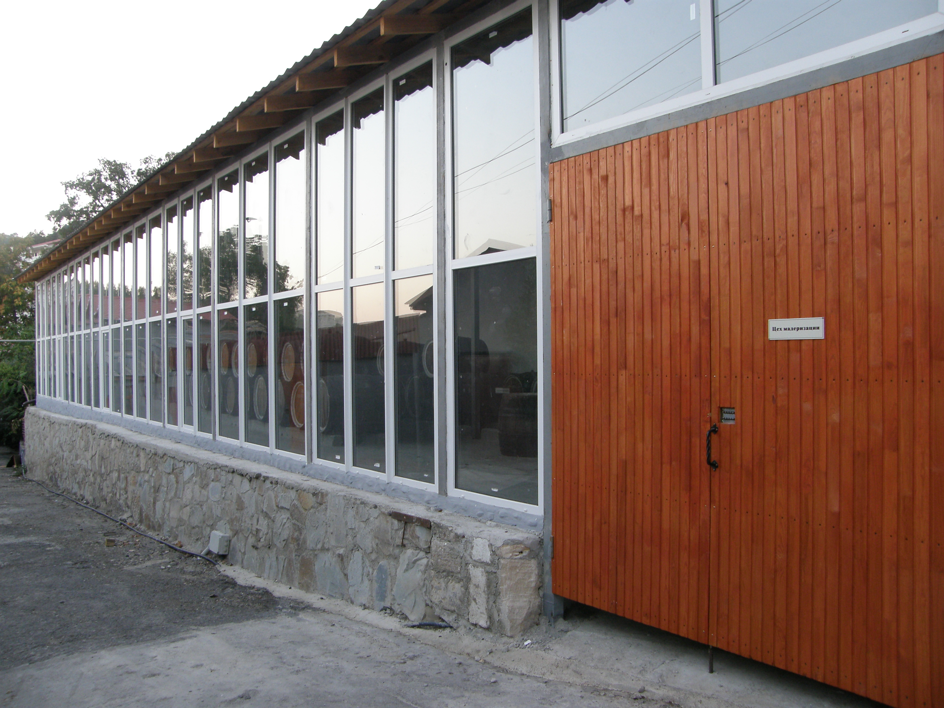 Цех мадеризации винодельческого предприятия «Ливадия» (ГП «Ливадия»), входящего в состав ГК НПАО «Массандра»